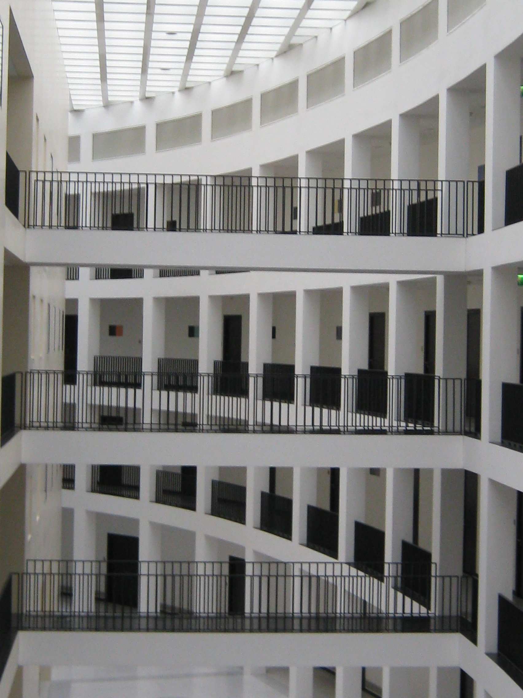 Innenansicht des neuen Bundespräsidialamtes in Berlin